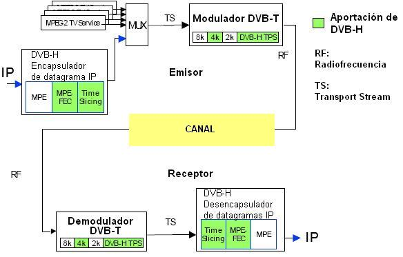 Sistema DVB-H